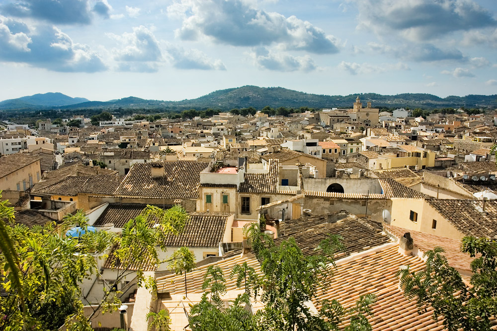 Arta overview